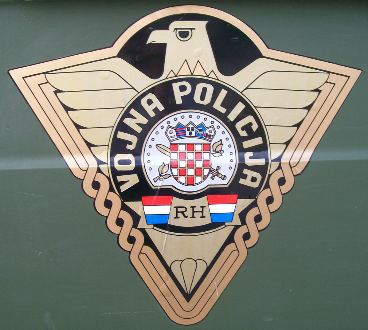 Vojna policija oznaka na automobilu